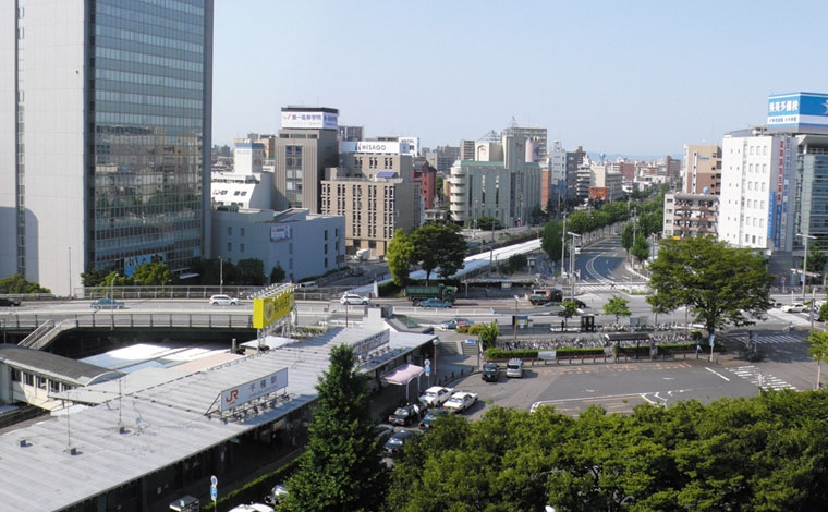 千種駅周辺